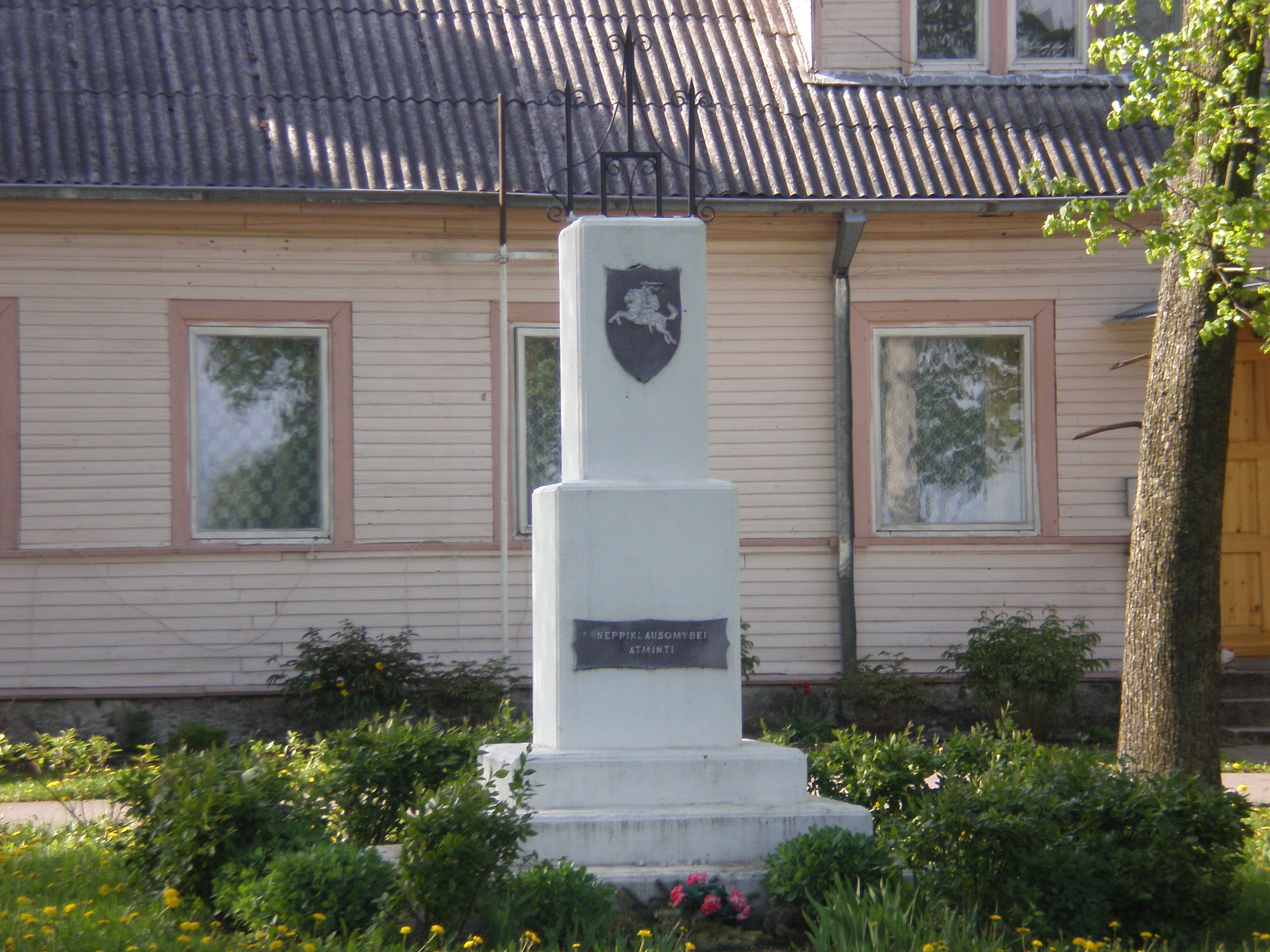 Paminklas nepriklausomybei Vandžiogaloje